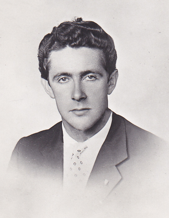 Luigi Carpaneda